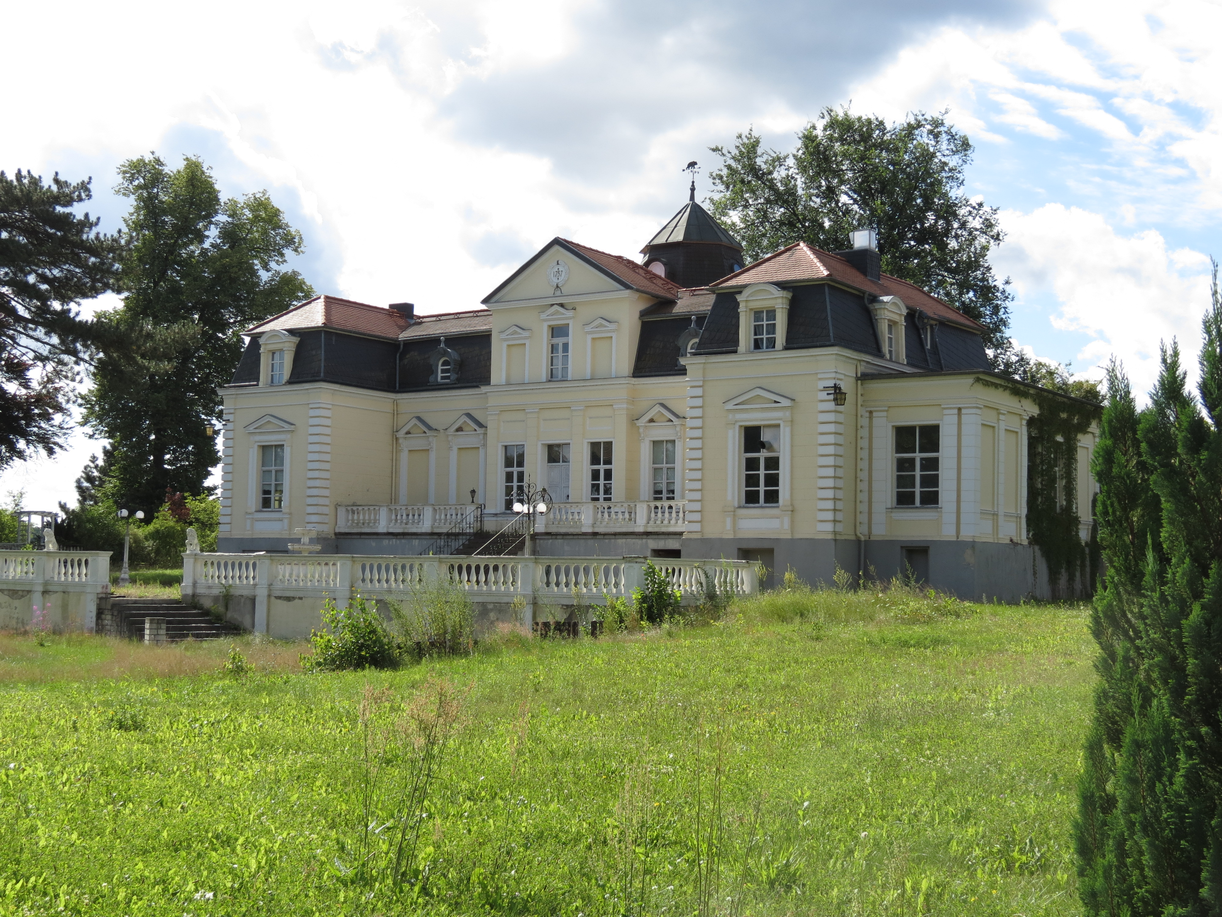 Gutshaus Neuhof, Ostseite, Neuhof, Gemeindeteil der Stadt Zossen, Brandenburg, Deutschland